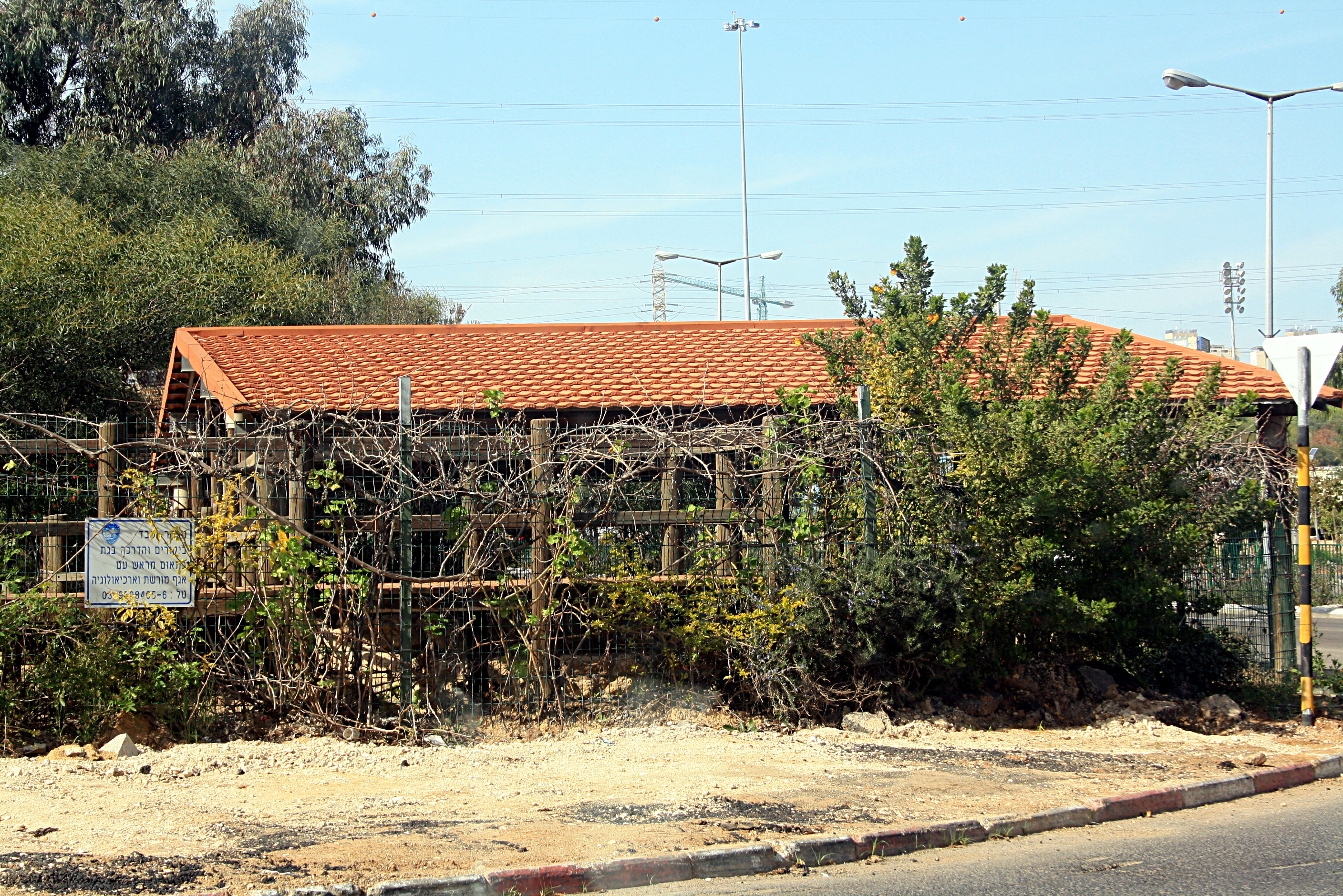 he:גן הגתות.